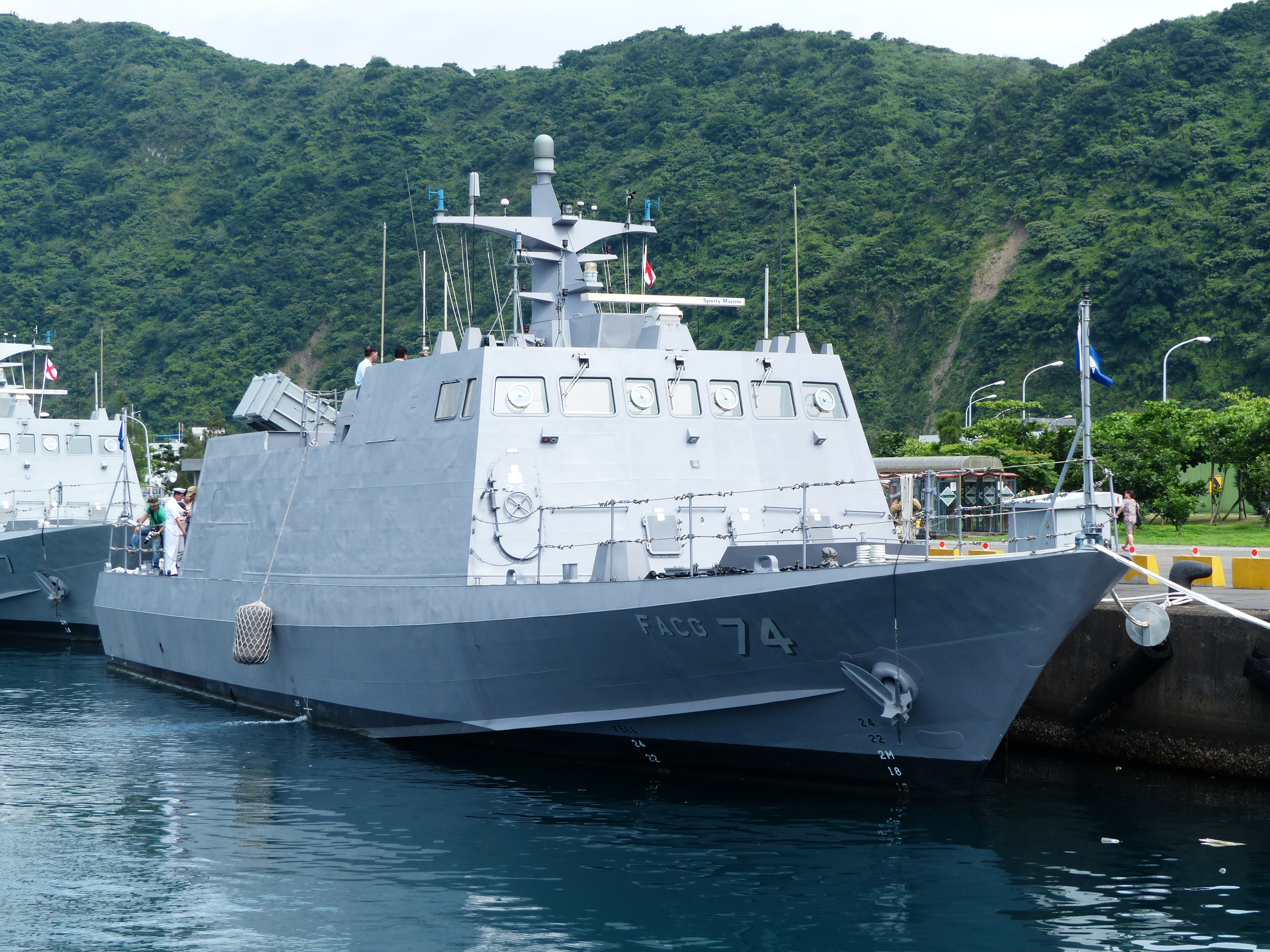 2013年中正軍港營區開放活動，13號碼頭的光華六號飛彈快艇FACG-74右前方。